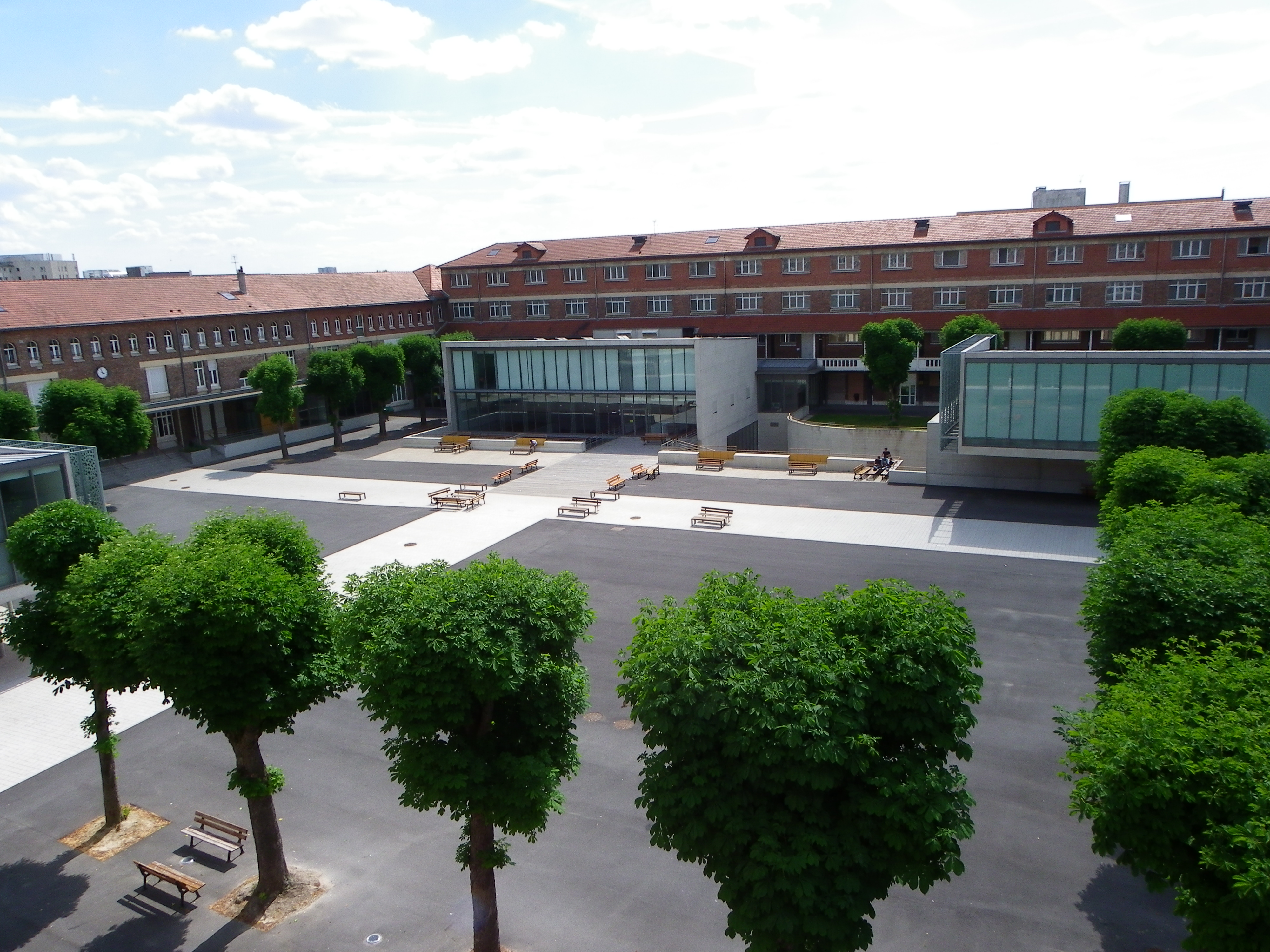 Cour intérieure du Lycéen Franklin Roosevelt à Reims en été.